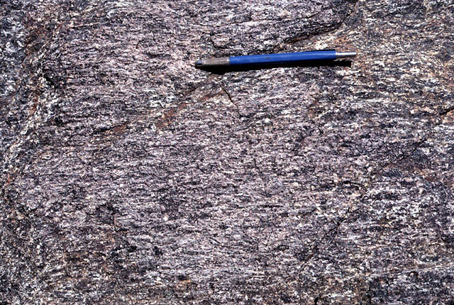 Tonalite to quartz diorite rock.